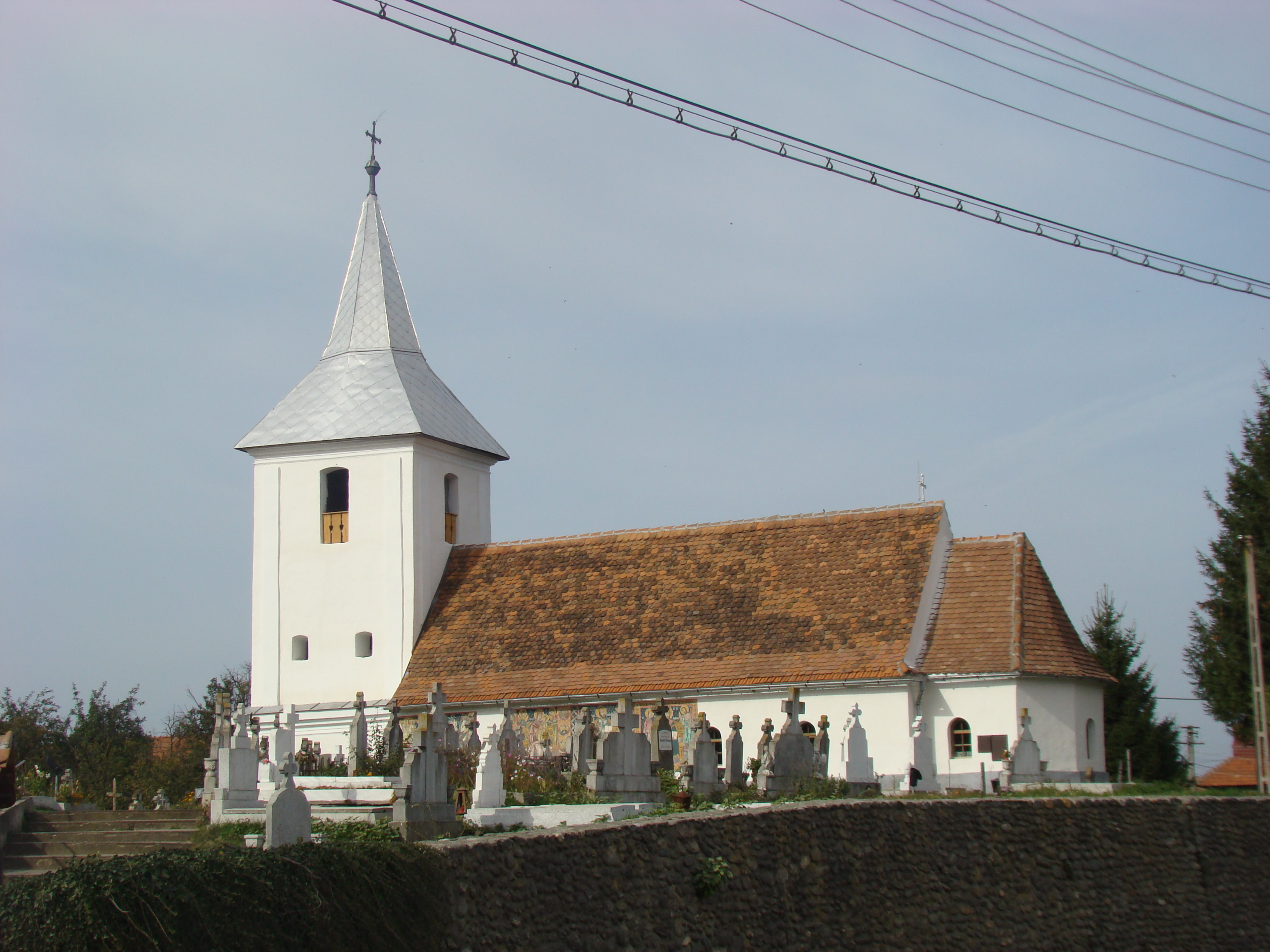 DN 7c (Cârțișoara-Sibiu)